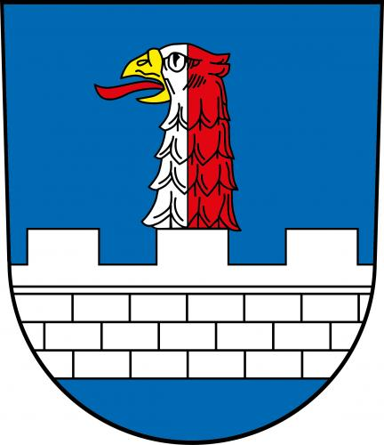 Zdislavice znak